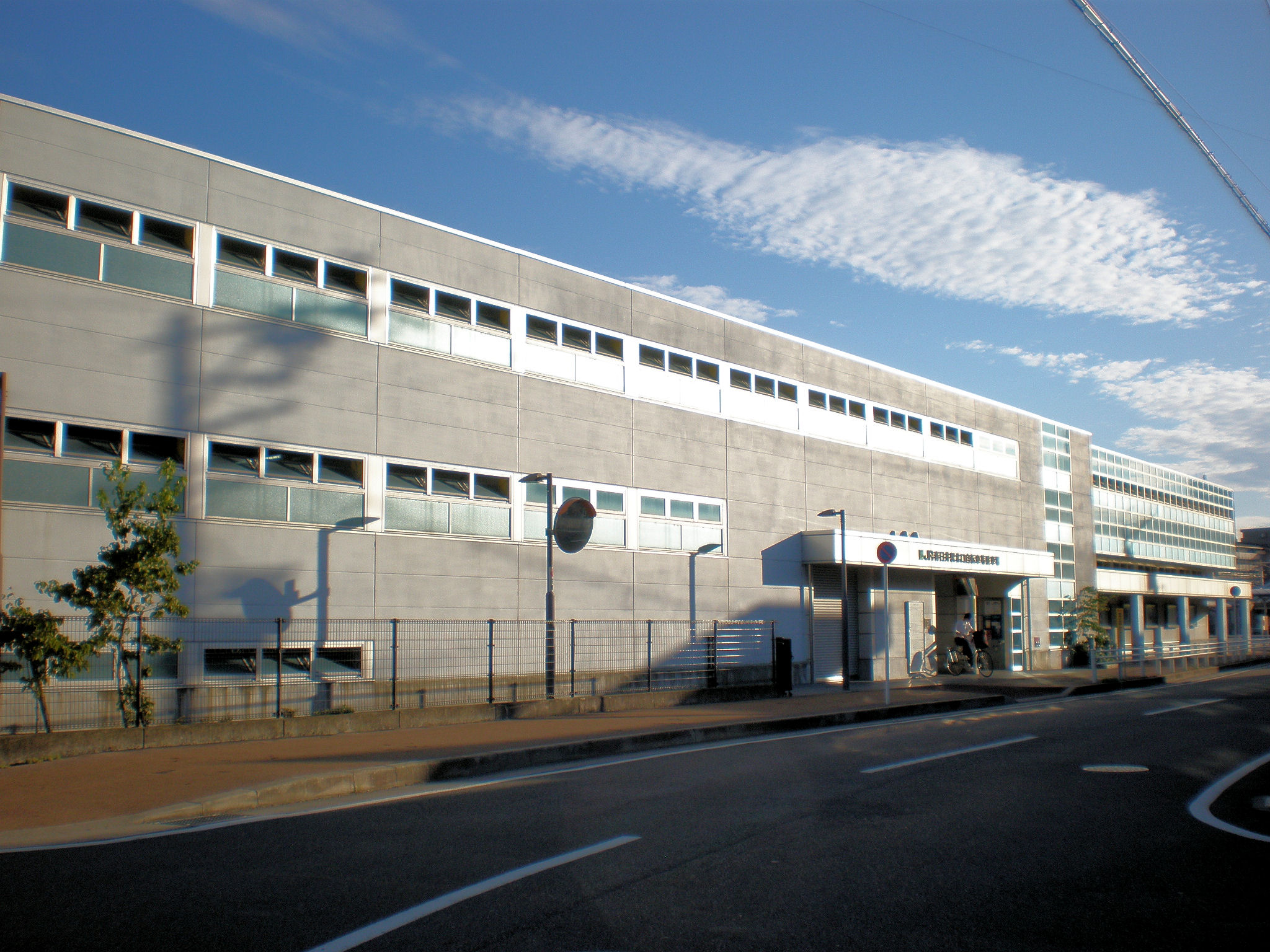 愛知県春日井市のJR春日井駅北口にある駐輪場